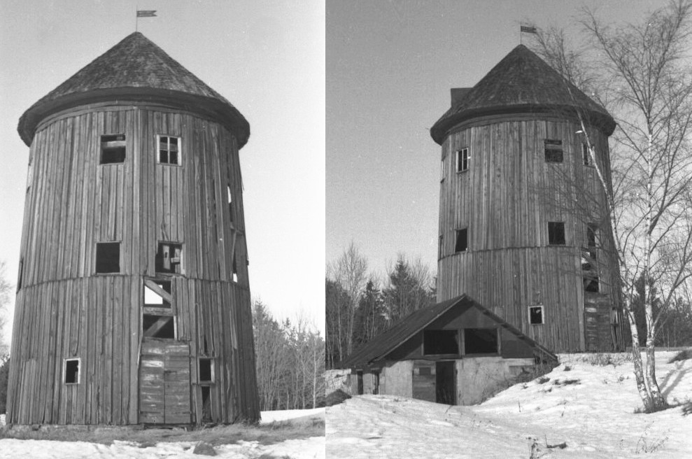 Rolsta kvarn (tidigare Stora Tissan)